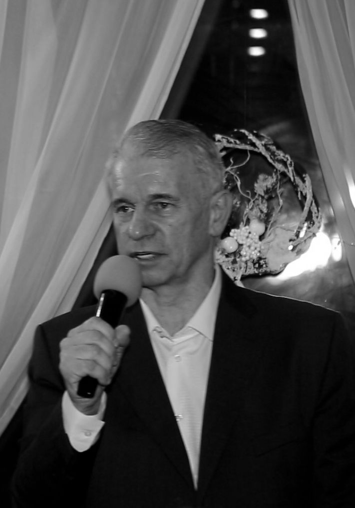 Персональная фотография Киреева С.В.